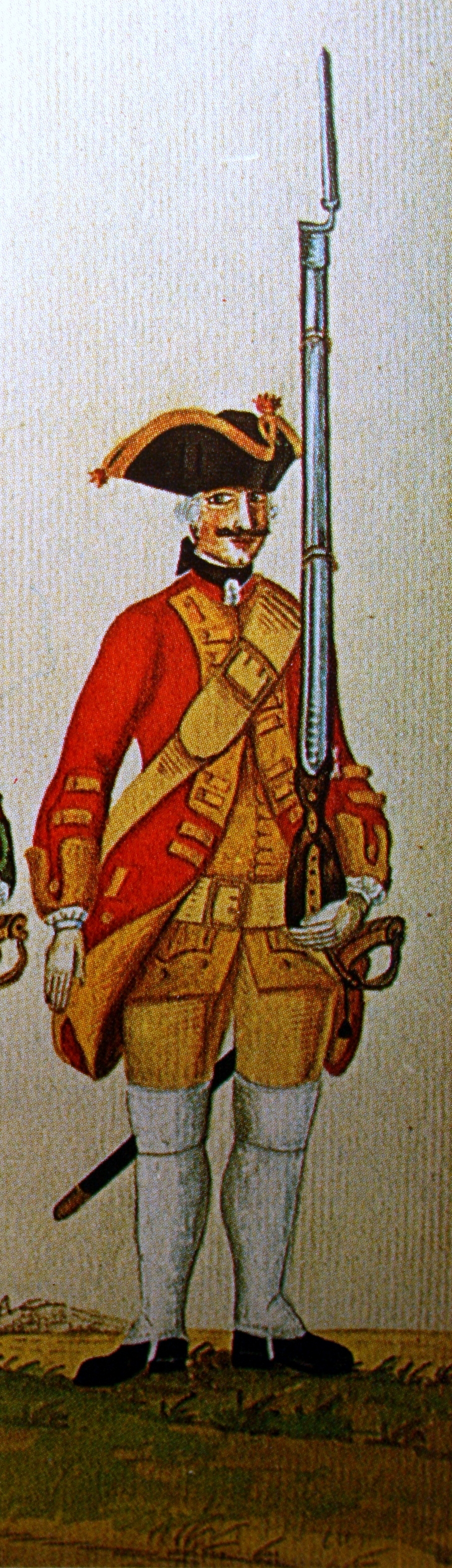 Infanterieregiment No. 11 A der kurhannoverschen Armee während des Siebenjährigen Krieges.